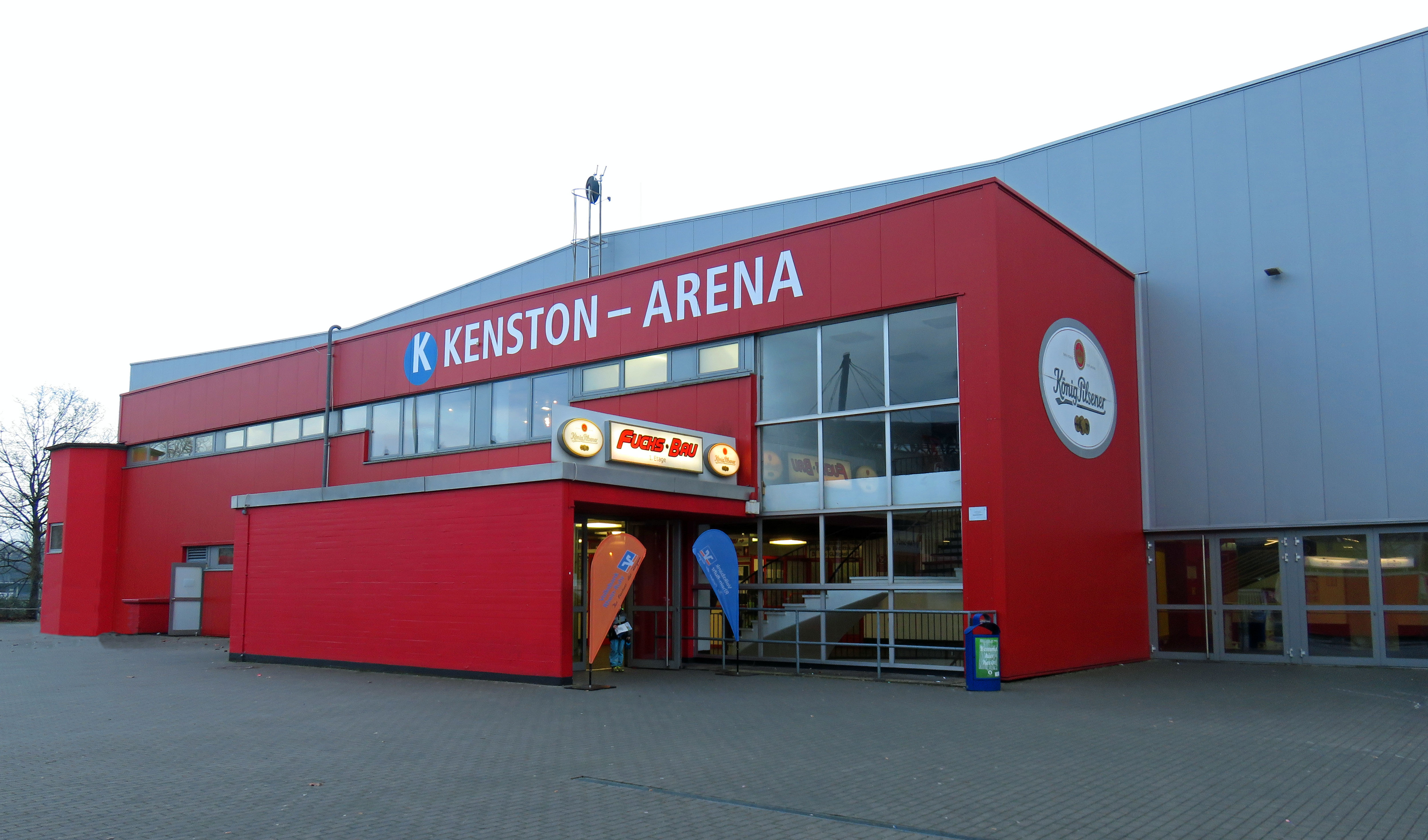 Kenston Arena - Eishalle Duisburg